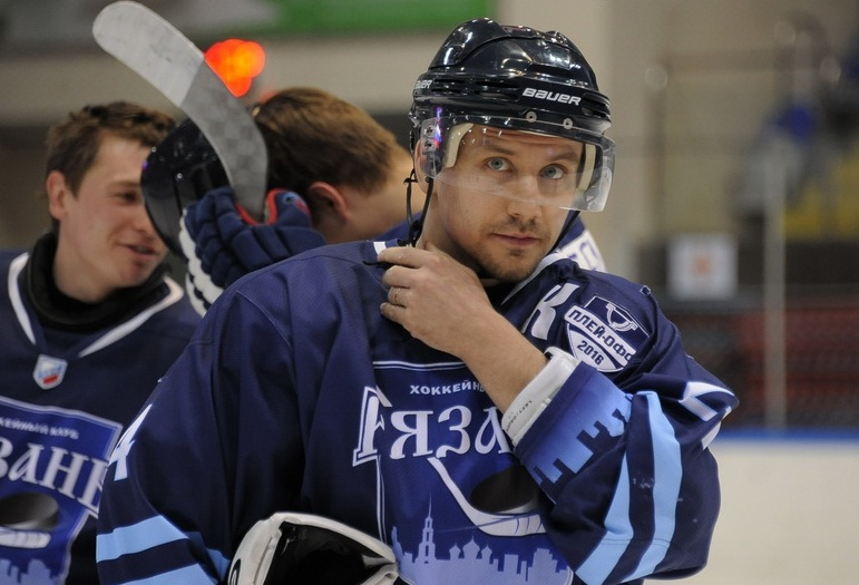 Фото с матча закрытия сезона 2015-2016, хоккейный клуб Рязань